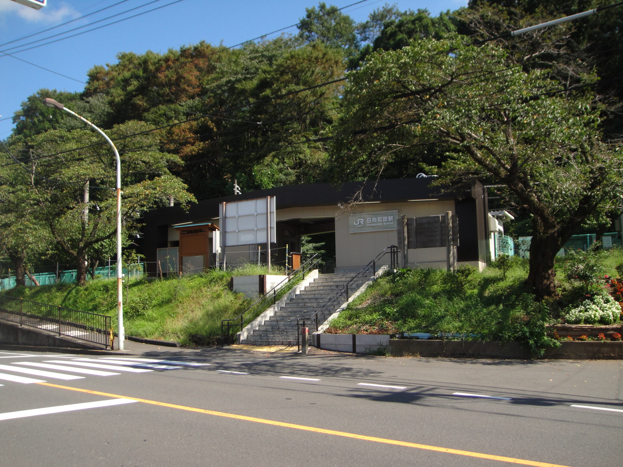 JR青梅線の日向和田駅前を撮影